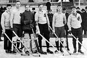 First Swedish Champions in ice hockey 1922, "IK Göta". From left Bror ”Brollan” Arwe, Birger ”Bigge” Holmqvist, Einar ”Hund-Eje” Olsson (goalkeeper), Einar ”Stor-Klas” Svensson, Åke Nyberg, Einar ”Knatten” Lundell.